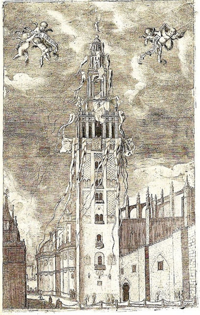 Matías de Arteaga, Torre de la Giralda, col. Fernando de la Torre Farfán, Fiestas de la S. Iglesia metropolitana y patriarcal de Sevilla, al nuevo culto del señor Rey S. Fernando..., Sevilla 1671 (sic), estampa calcográfica ante página 1.